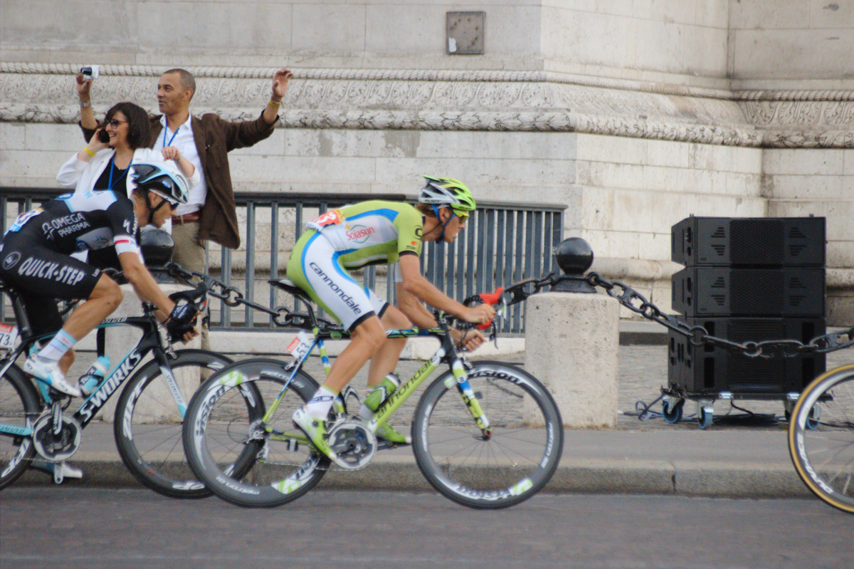 21è étape du Tour de France 2014, Evry-Paris Champs Elysées, photo prise à Paris au pied de l'Arc de Triomphe.